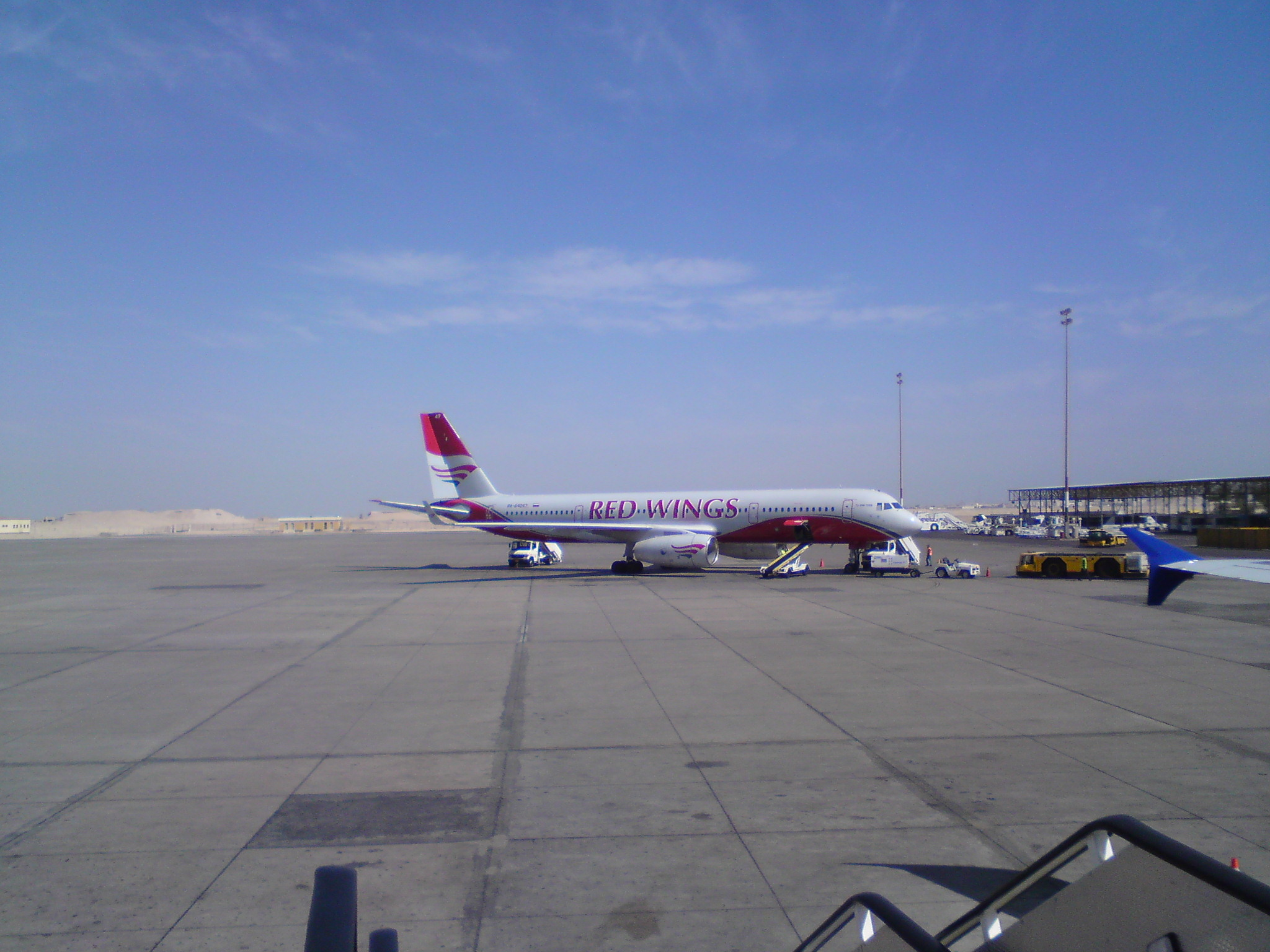 Tupolew Tu-204-100 der Red Wings auf dem Flughafen in Hurghada am 04. April 2009.